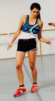 Clara Furey.